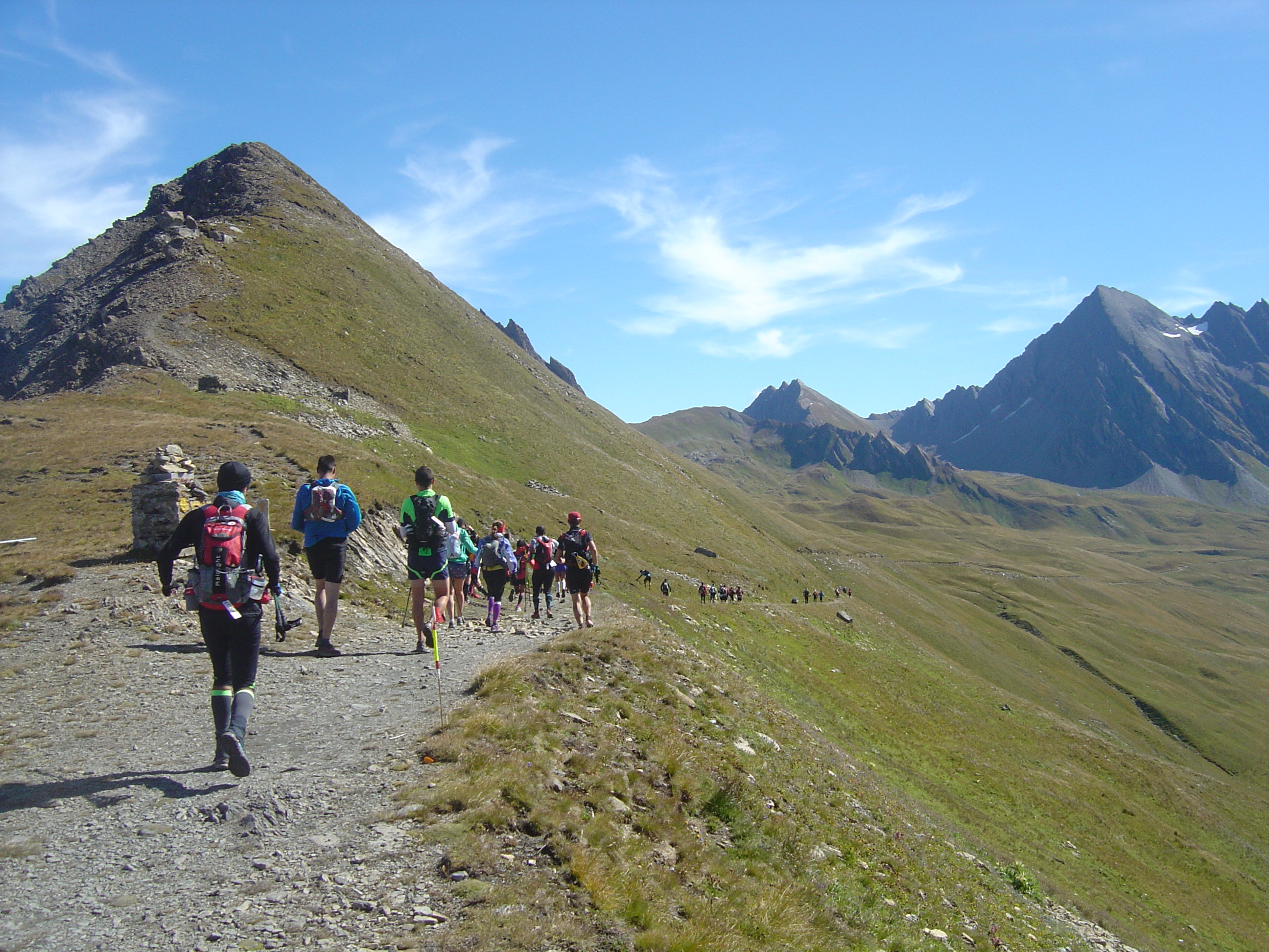 Le col de Chavannes (2603m) et sa descente à droite sur les Traces des Ducs de Savoie 2014 au km 19,7